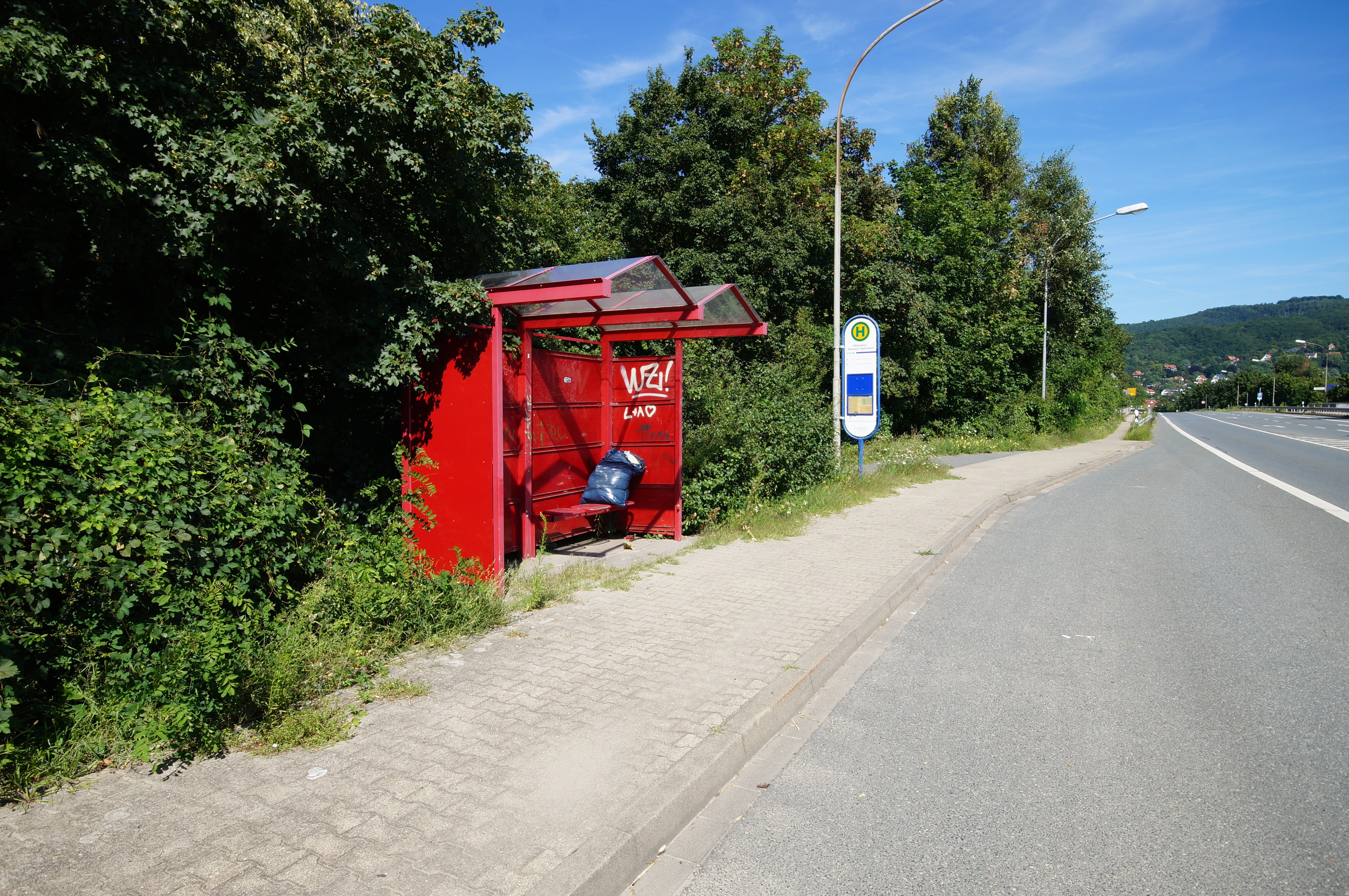 Bushaltestelle des Alsbach-Hähnleiner Bahnhofs, an der Busse der Linien K50 und 8N halten